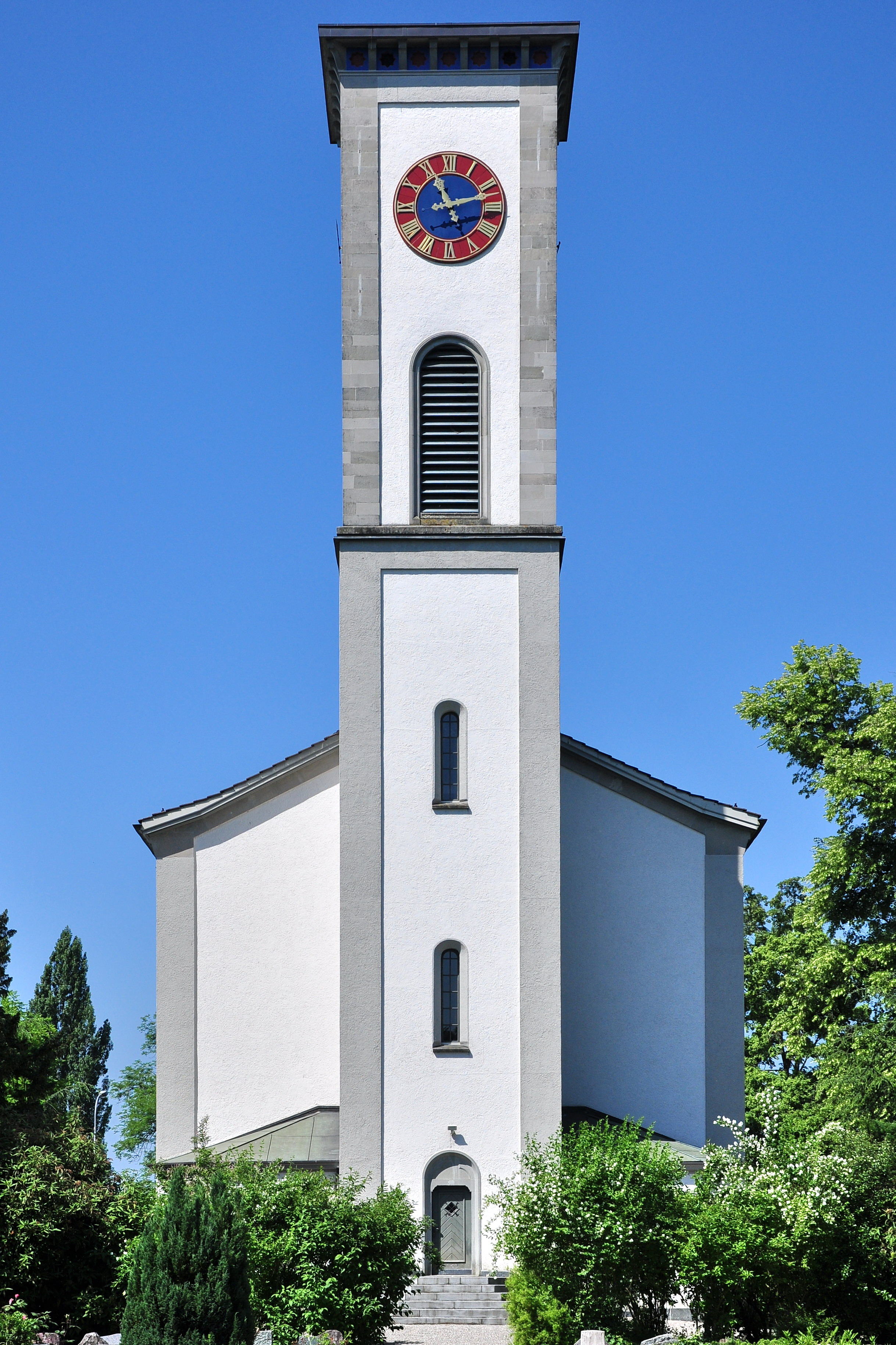 Reformierte Kirche in Rapperswil (Switzerland)